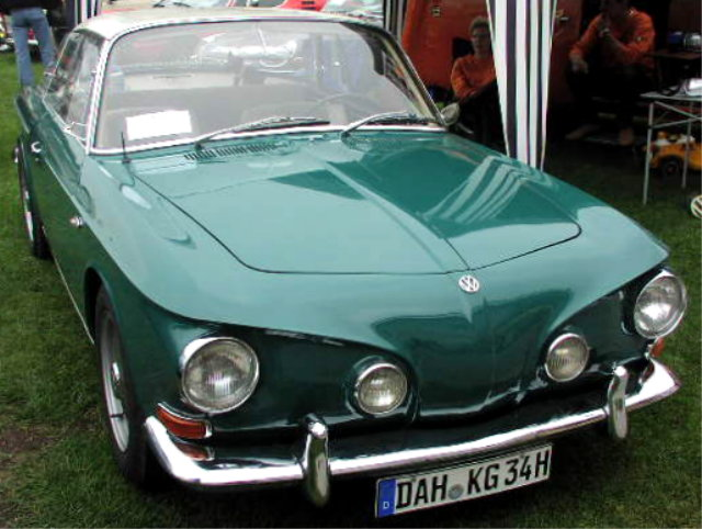 Volkswagen 1600 Karmann Ghia